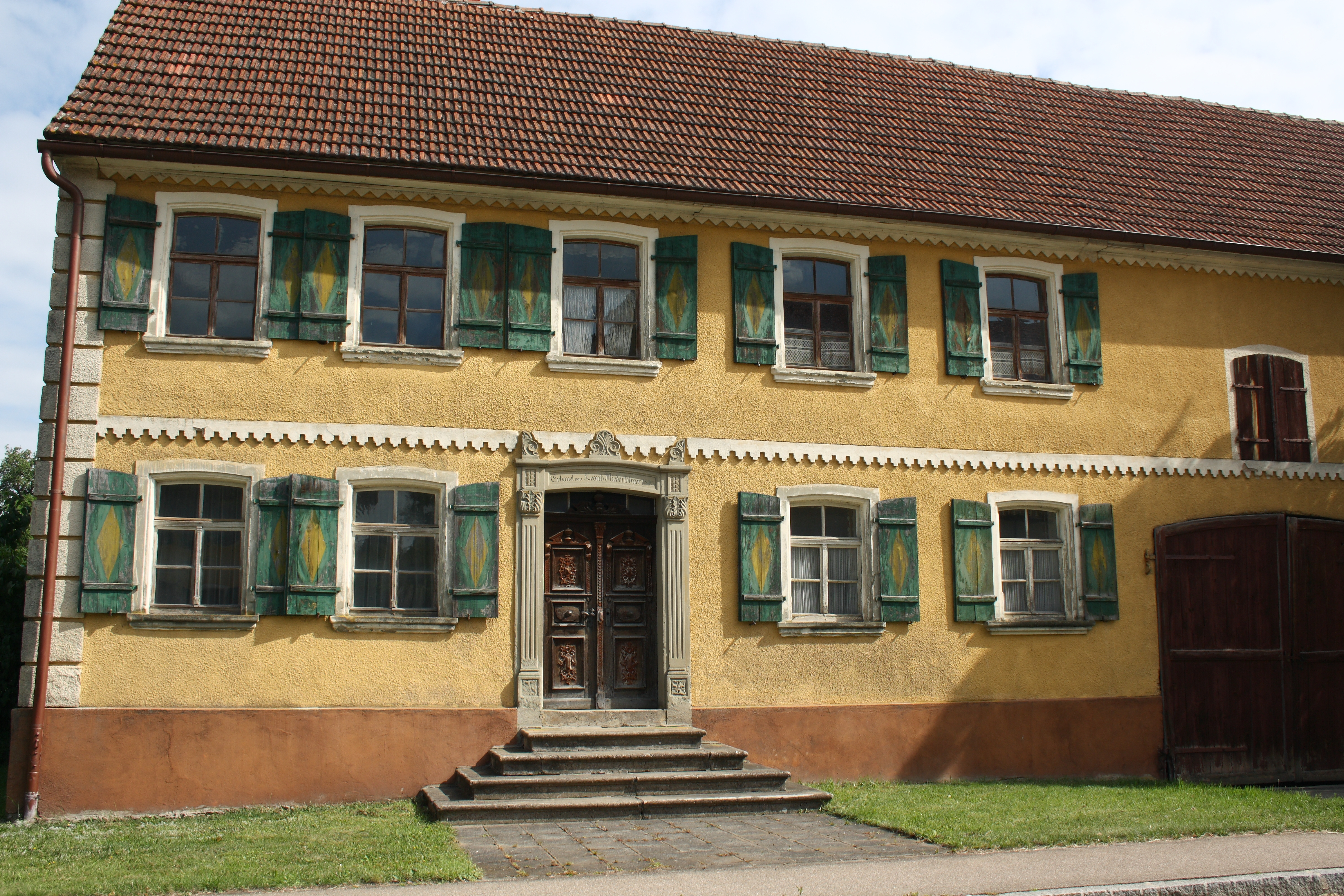 Ehemaliges Bauernhaus in Obermögersheim, einem Stadtteil von Wassertrüdingen im Landkreis Ansbach (Bayern), Obermögersheim 1, bezeichnet 1895